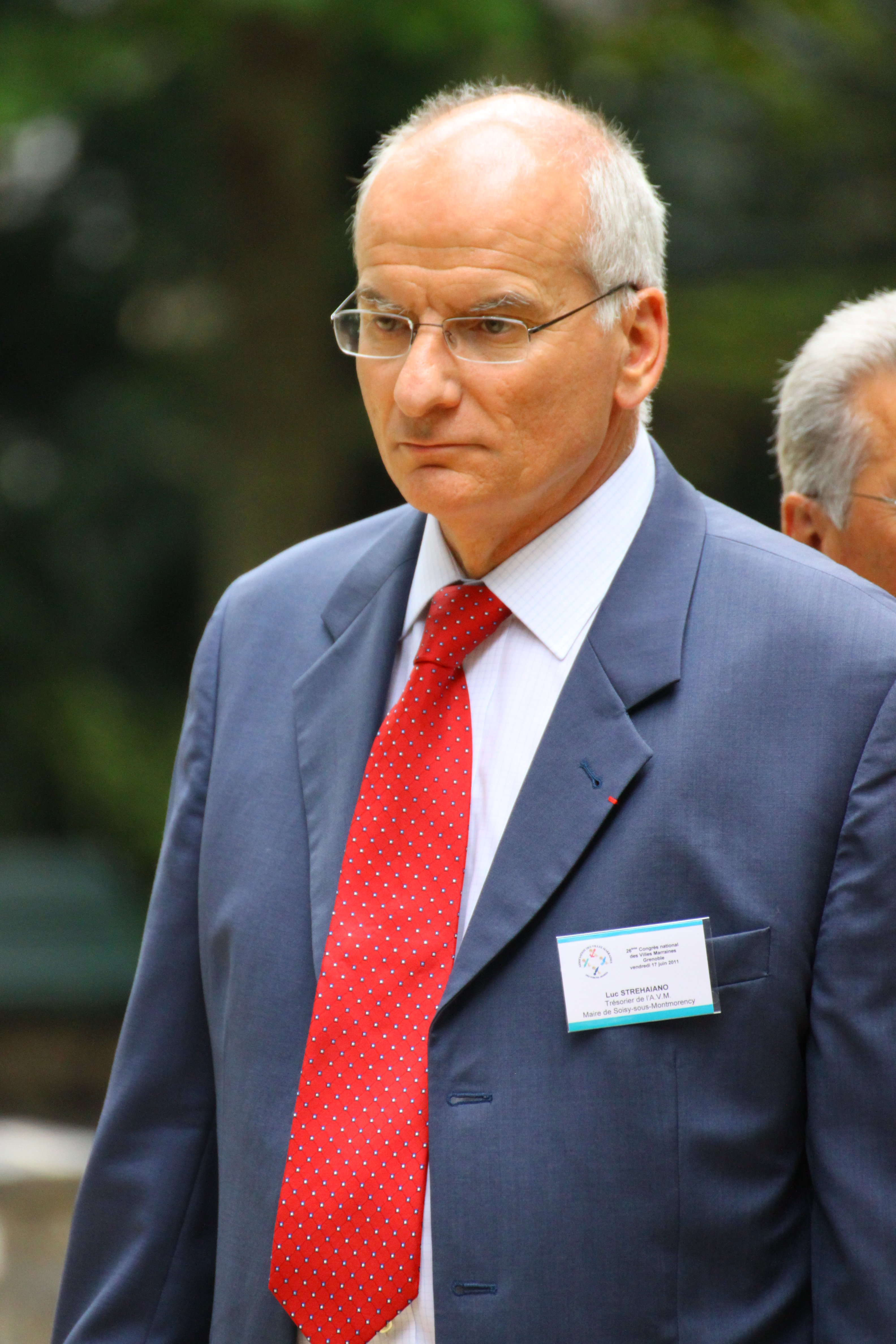 Luc Stréhaiano, maire de Soisy-sous-Montmorency en juin 2011 à Grenoble.